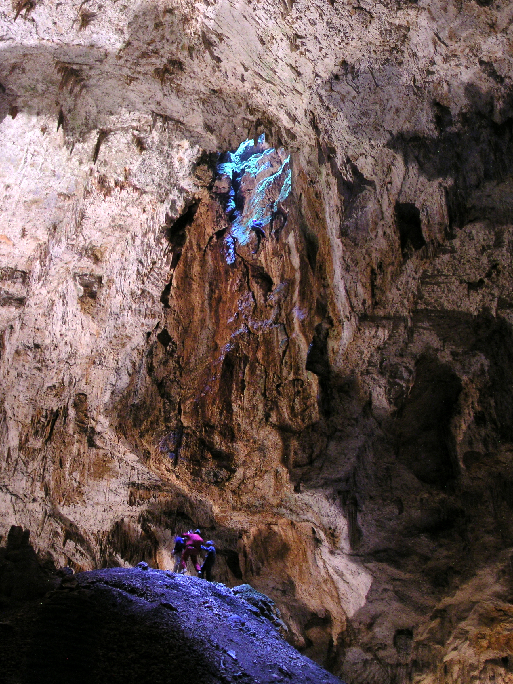 Descente par l'aven du Bertras, entrée naturelle de l'aven d'Orgnac, Ardèche, France.